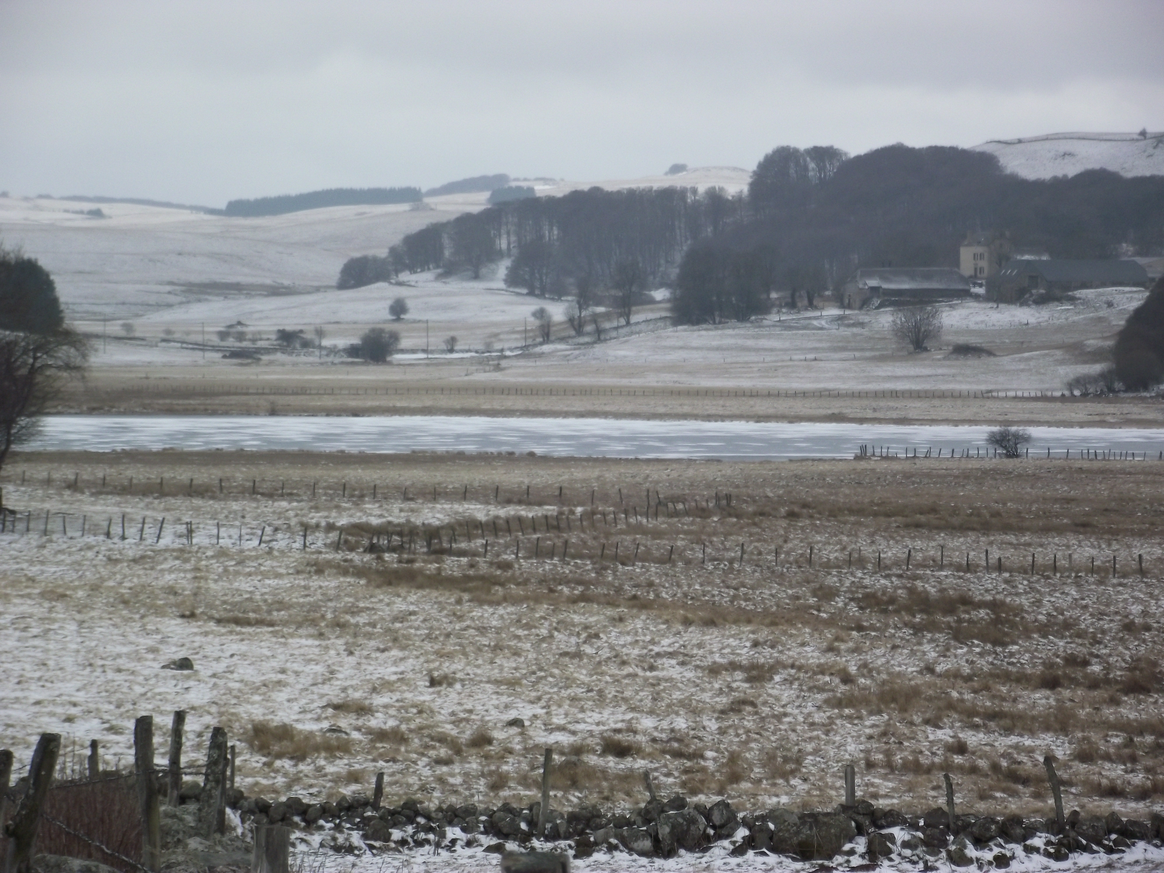 Le lac des Salhiens en hiver (Aubrac, Massif central, France). Le lac est entièrement pris par la glace. Photo prise début mars 2012.